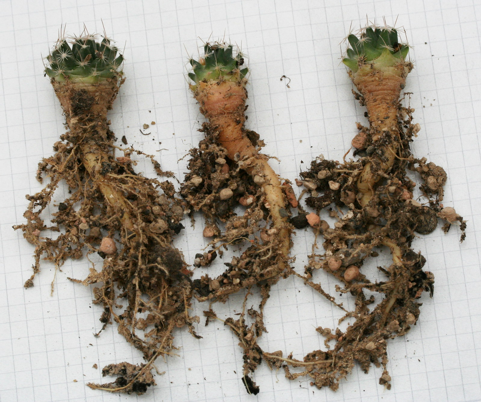 Mammillaria coahuilensis in Kultur, Wurzelbild